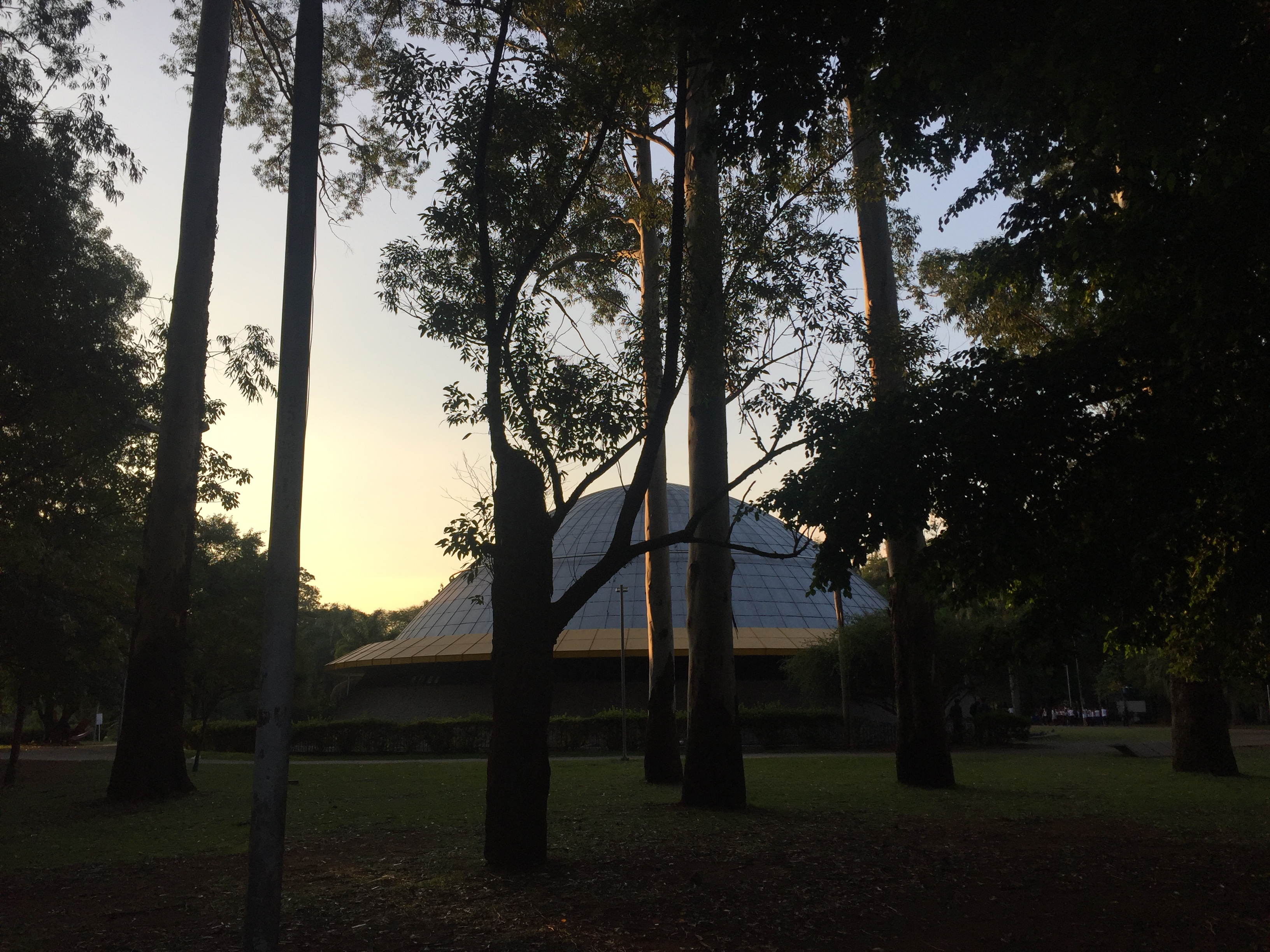 Arredores do Planetário Prof. Aristóteles Orsini situado no Parque do Ibirapuera, São Paulo (SP), Brasil